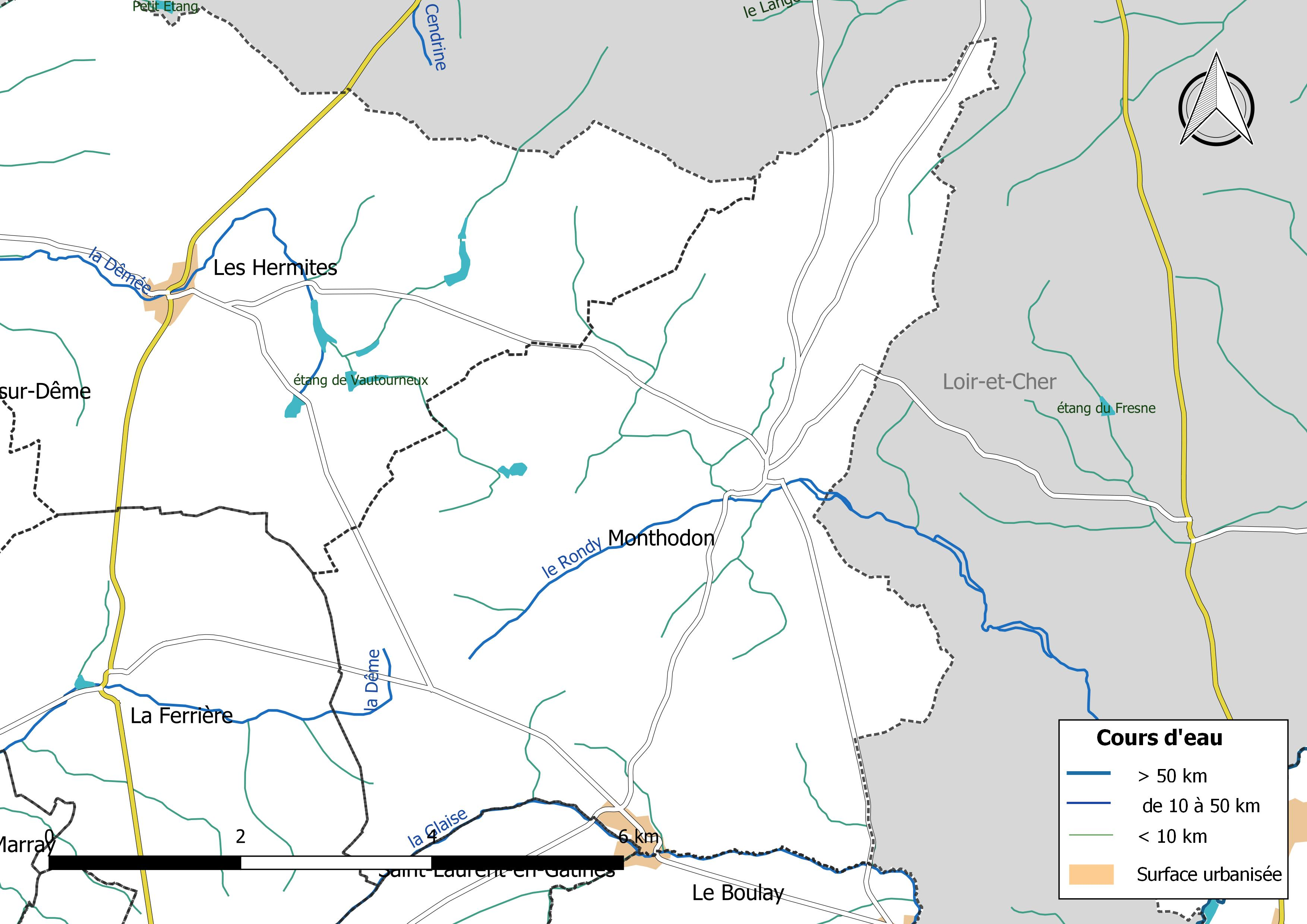 Carte du réseau hydrographique de la commune de Monthodon (France).